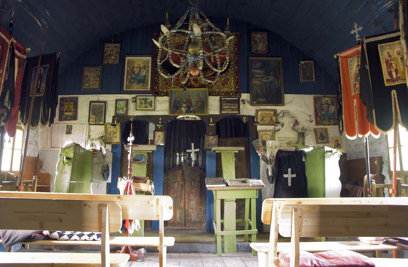 Biserica de lemn din Hinchiriş, Bihor, nava.